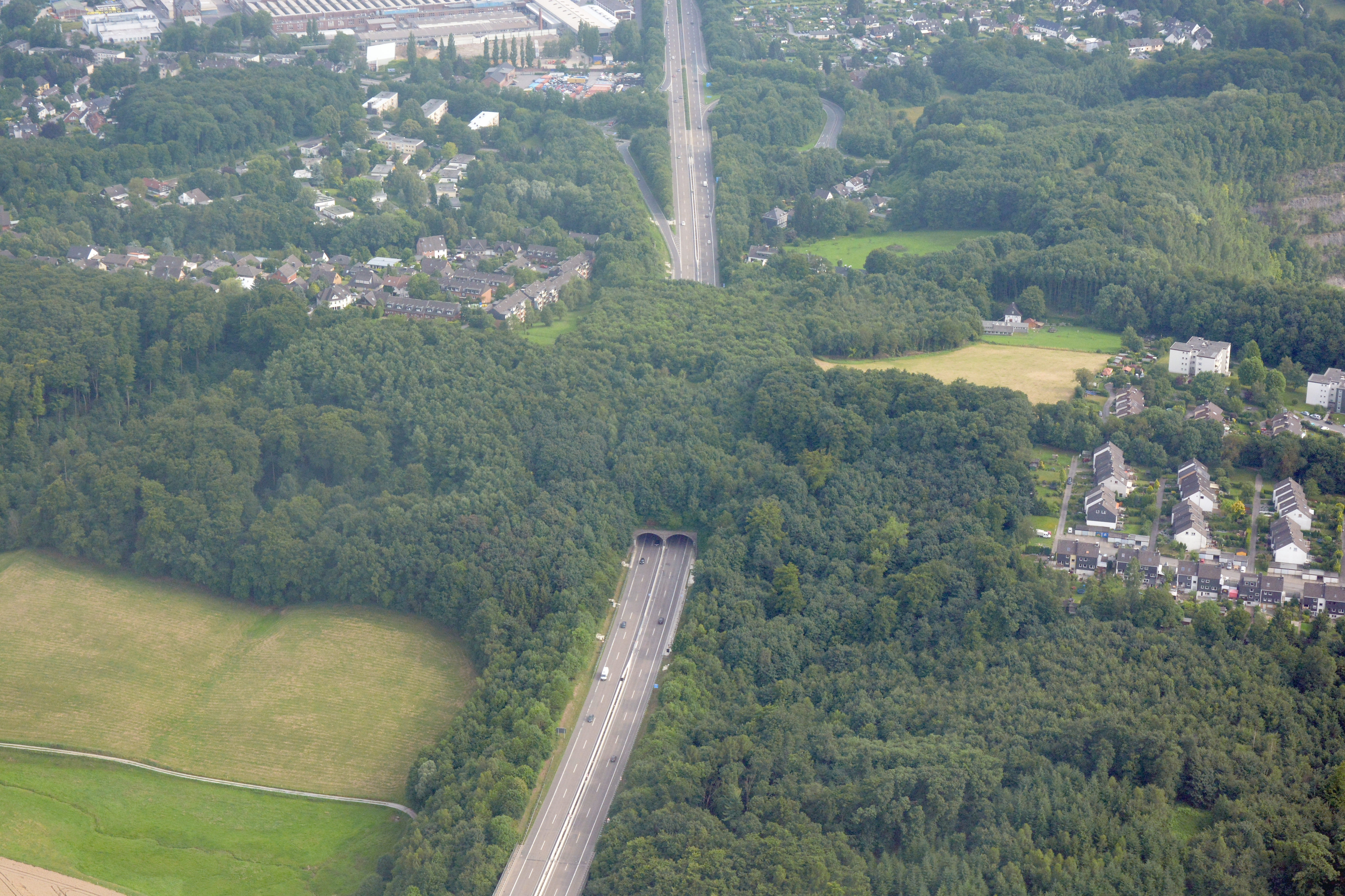 Tunnel Großer Busch